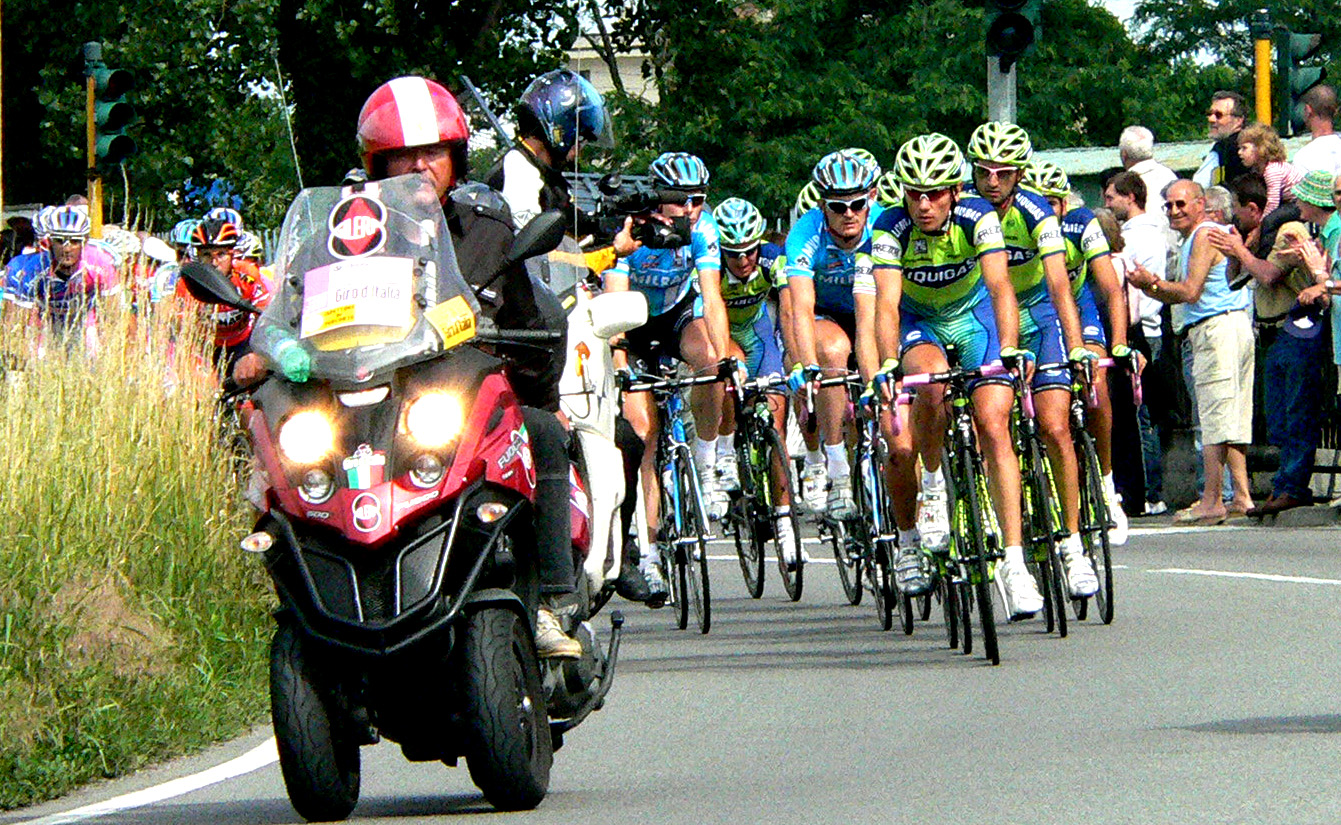 Lo scooter Gilera con tre ruote era la moto ufficiale del giro?